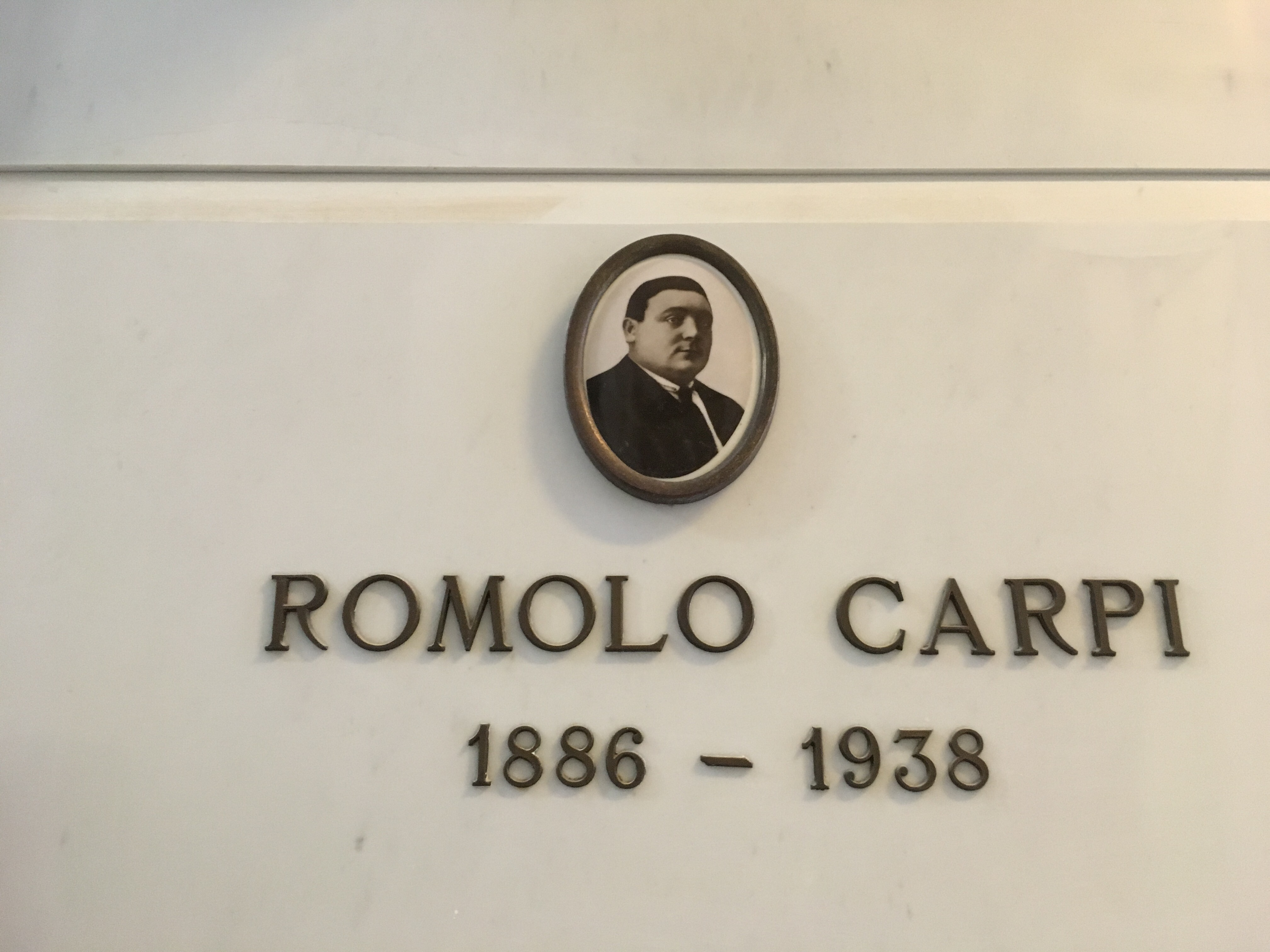 La tomba di Romolo Carpi nel cimitero di Santa Margherita Ligure